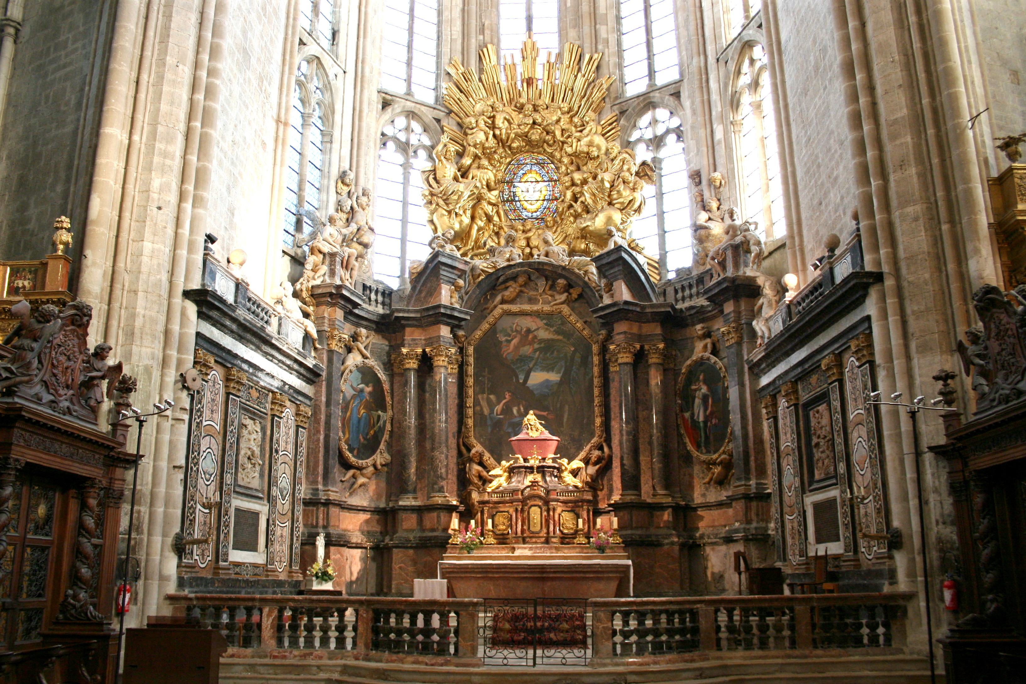 Choeur de la basilique de Saint-Maximin dans le département du Var.